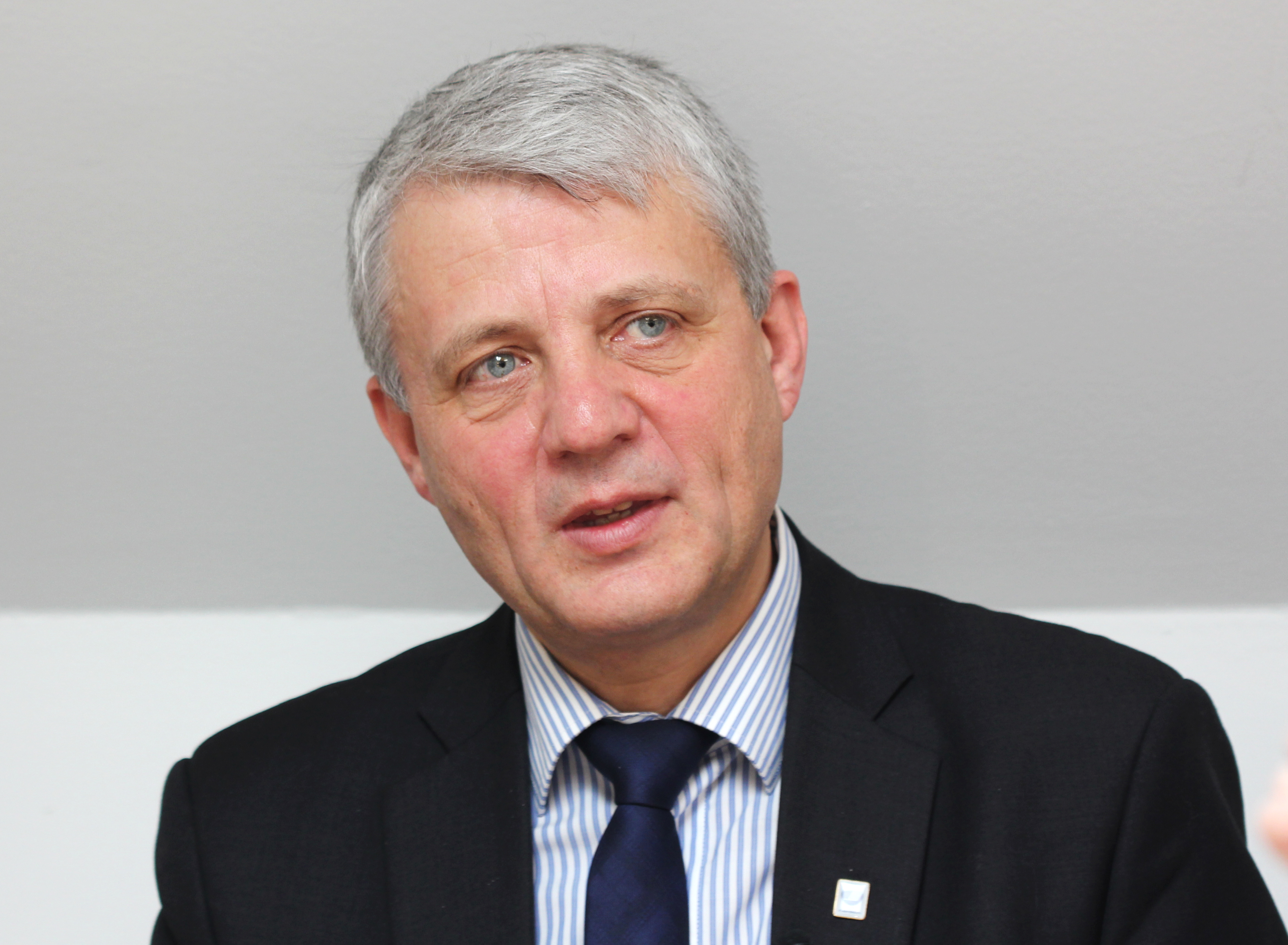 Dagfinn Høybråten, Generalsekretær